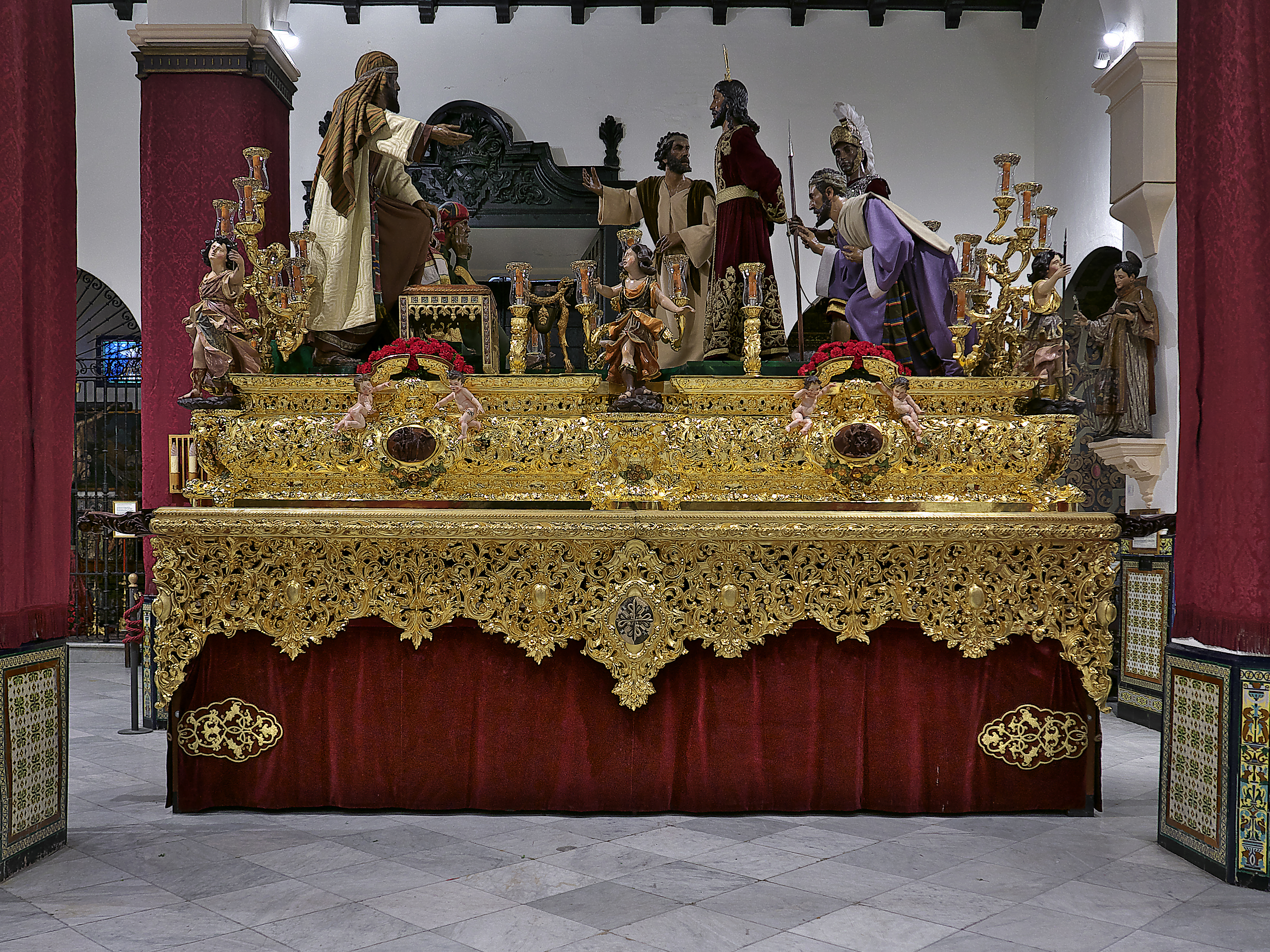 Iglesia de San Lorenzo (Sevilla). El proceso de Cristo ante Anás. Paso de misterio de la Hermandad del Dulce Nombre (Sevilla).